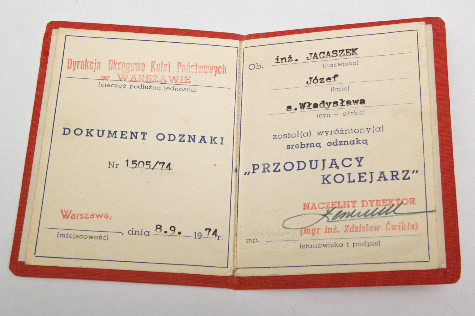 Legitymacja odznaki "Przodujący Kolejarz"